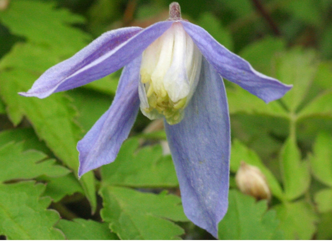 Clematis_alpina (Clematide alpina) "Giardino Botanico delle Alpi Orientali" (loc. Monte Faverghera) Belluno, quota 1500 m s.l.m.